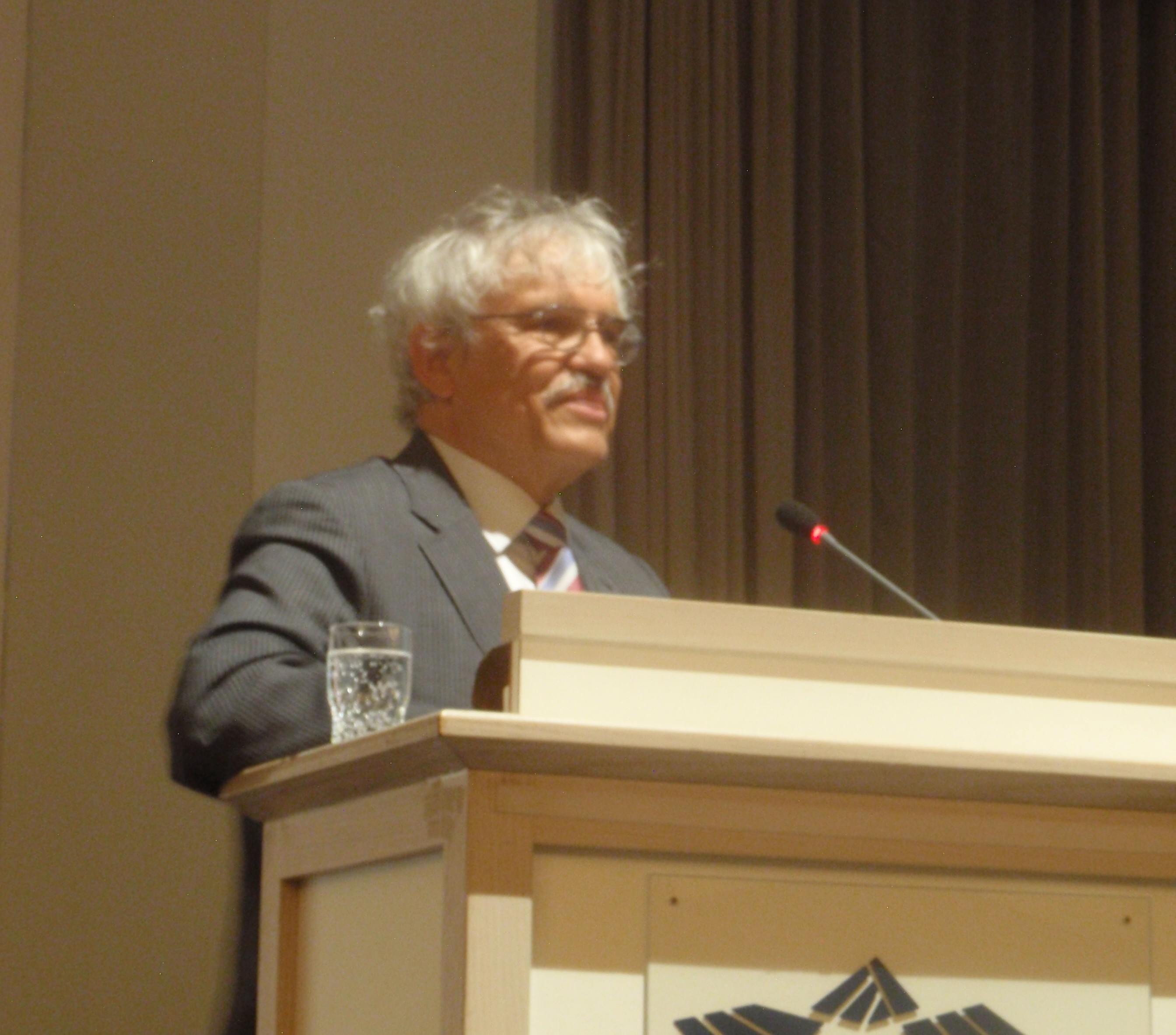 Prof. Dr. Jürgen Kriz (* 5. Dezember 1944 in Ehrhorn), pensionierter Professor Professor für Psychotherapie und Klinische Psychologie an der Universität Osnabrück, auf dem Kongress "40 Jahre GwG" am 12. Juni 2010 in Mainz